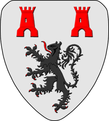 Armoiries de la commune de Jodoigne, blasonné d'argent au lion de sable armé et lampassé de gueules, accompagné en chef de deux tourelles du mesme